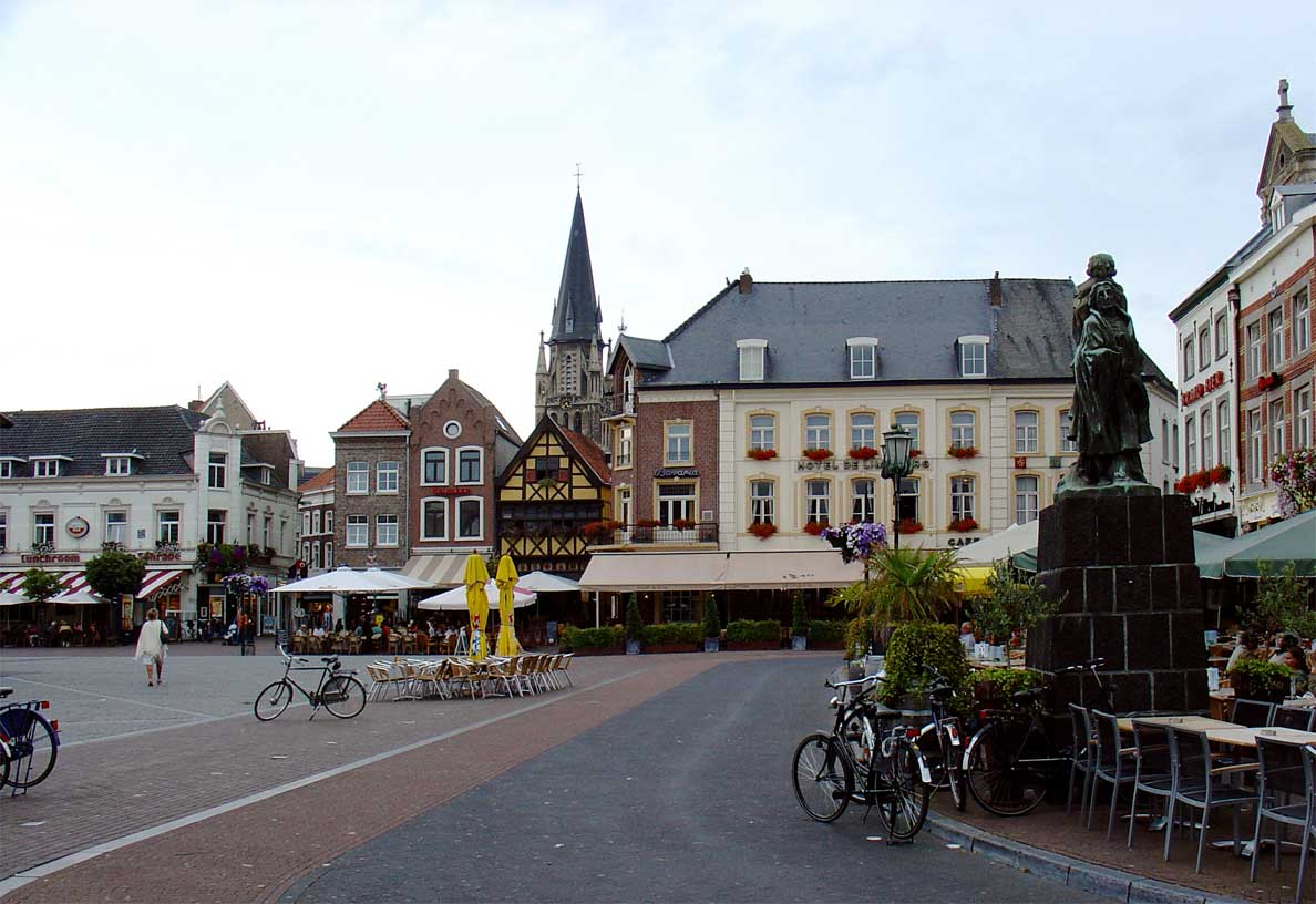 Markt te Sittard (Limburg). On the right World War II memorial by Charles Tangelder in 1957.